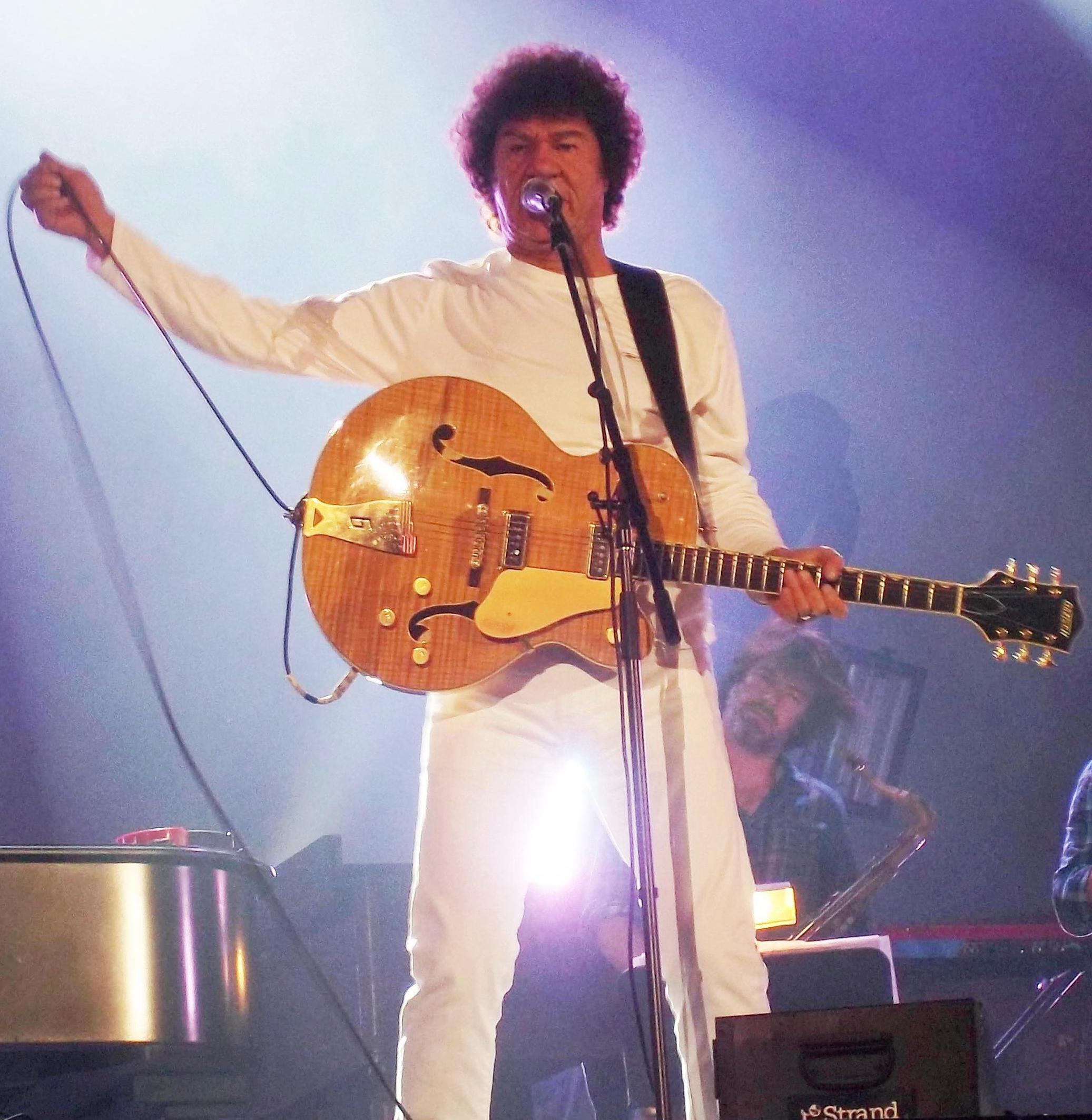 Spectacle de Robert Charlebois dans le cadre des FrancoFolies de Montréal le 13 juin 2012